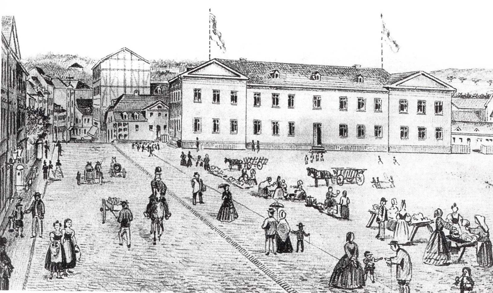 Die (nicht mehr bestehende) Stadtschule am Marktplatz in Wiesbaden. Diese war 1818 bis 1843 Sitz der nassauischen Stände. Es handelt sich um eine Zeichnung eines unbekannten Künstglers aus der ersten Hälfte des 19. Jahrhunderts